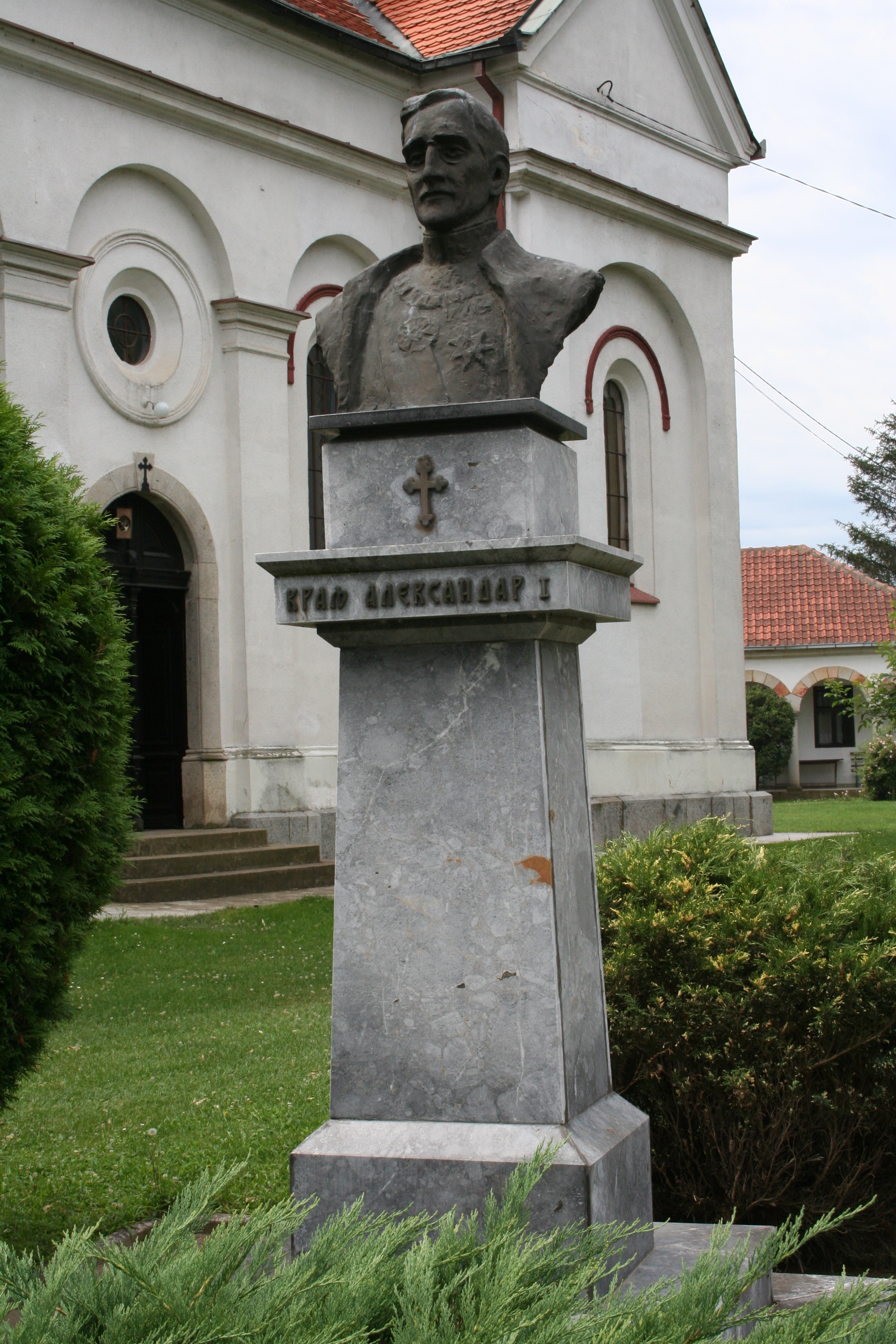 Crkva Sv. Ilije, Prnjavor